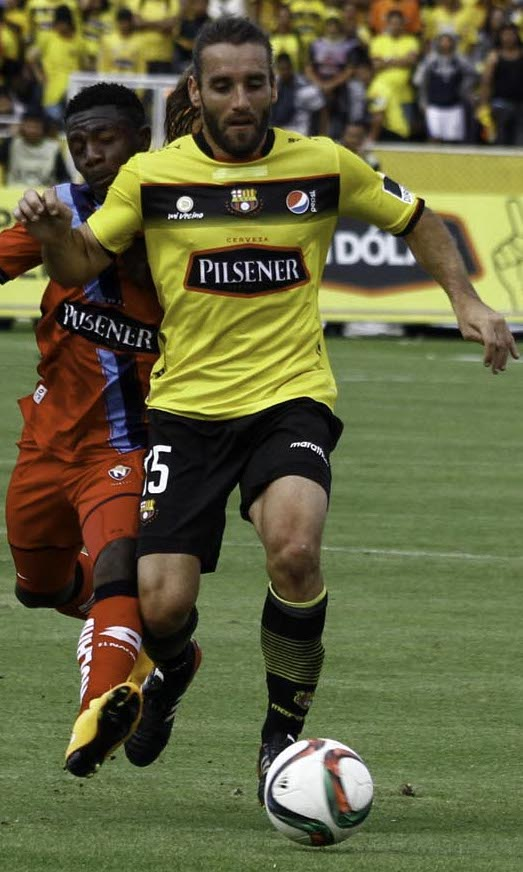 Alejandro Frezzotti en Bsc